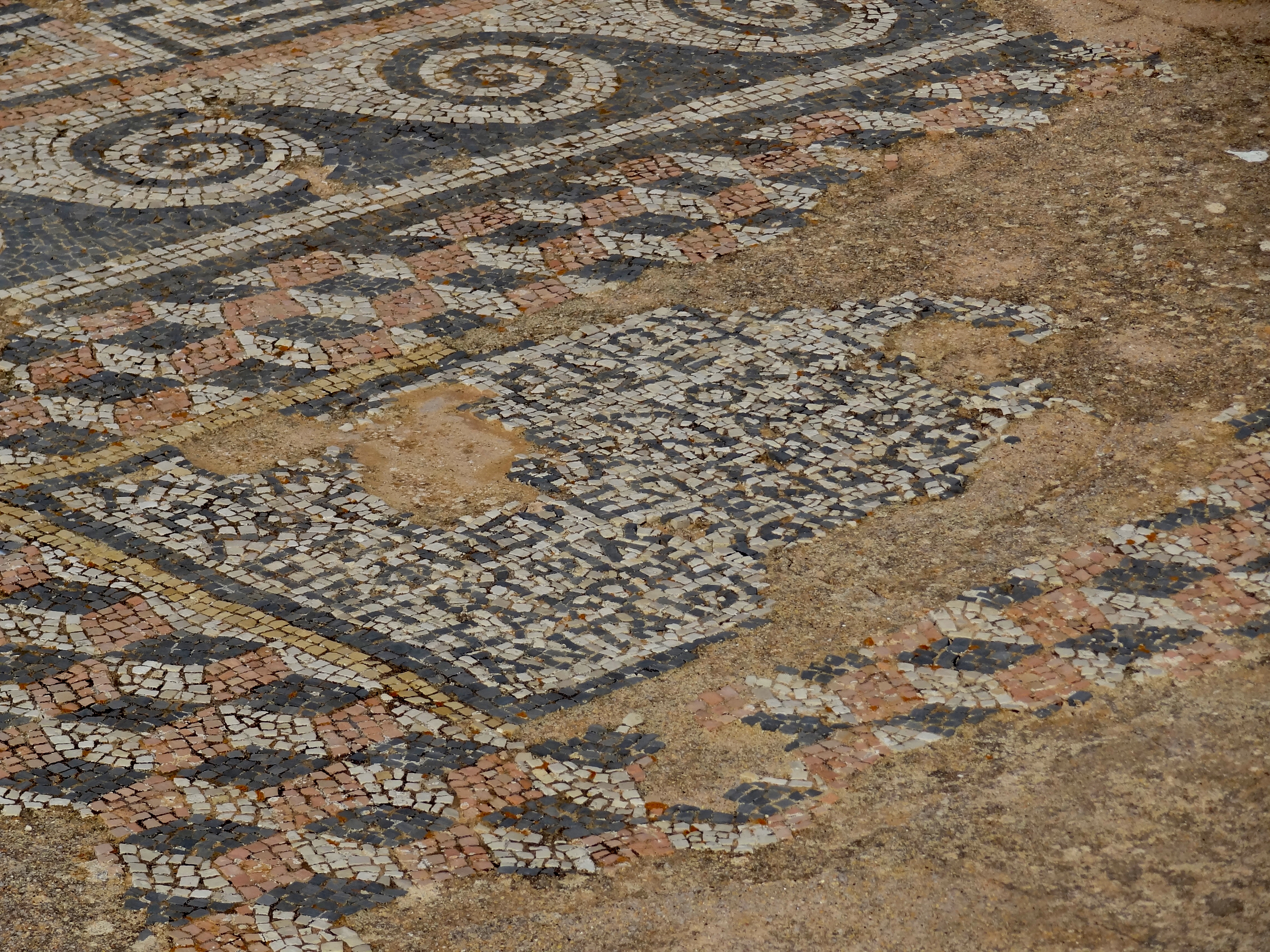 Heiligtum der syrischen Gottheiten in der Ausgrabungsstätte von Delos, Kykladen, Griechenland